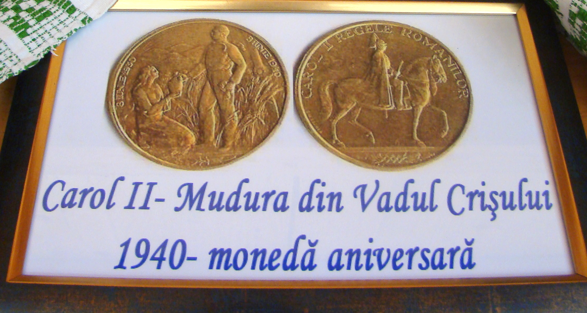 Muzeul din Vadu Crișului, judeţul Bihor